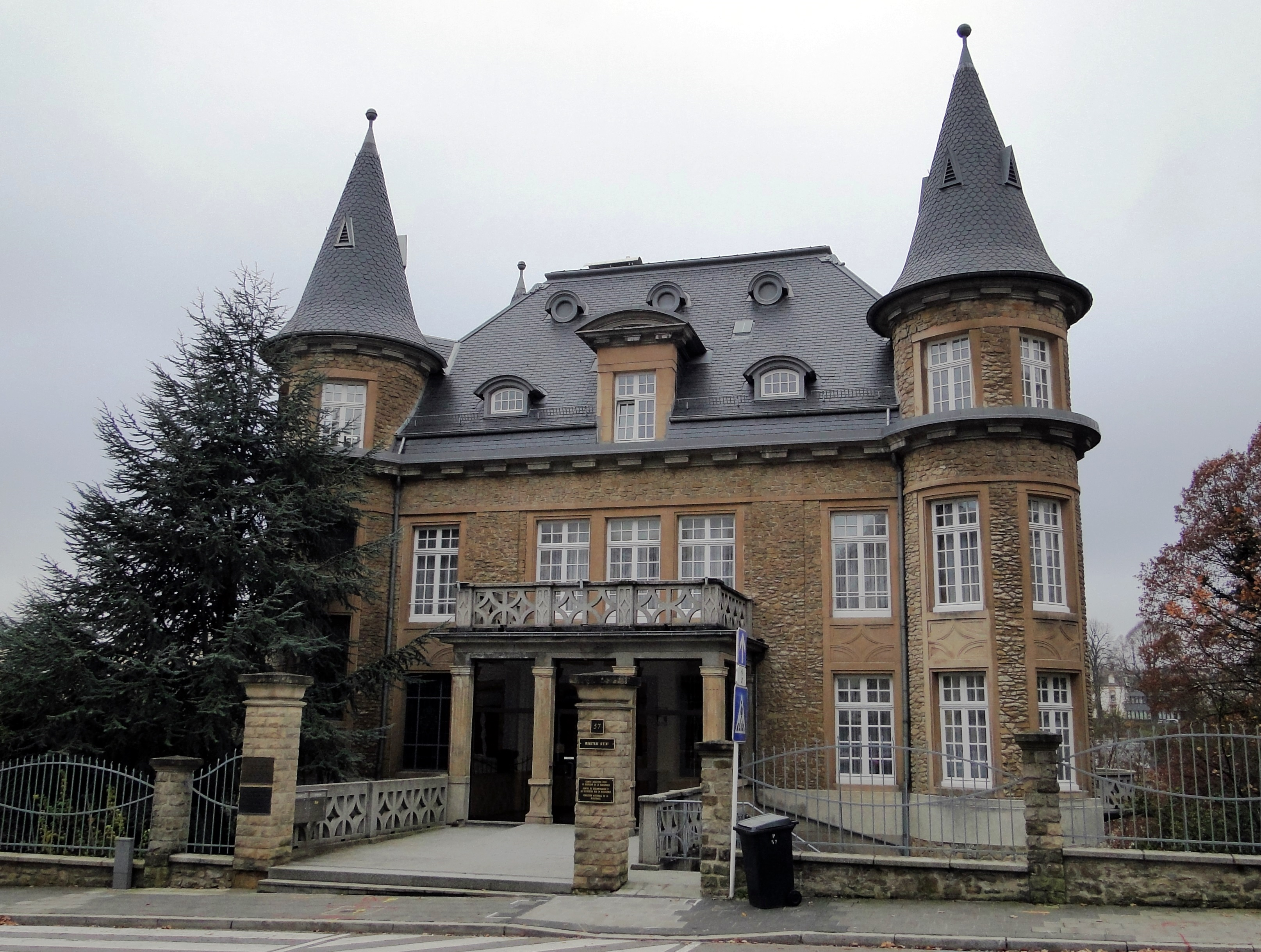 Pendant la 2e guerre mondiale, la Villa Pauly fût le siège de la Gestapo au Luxembourg